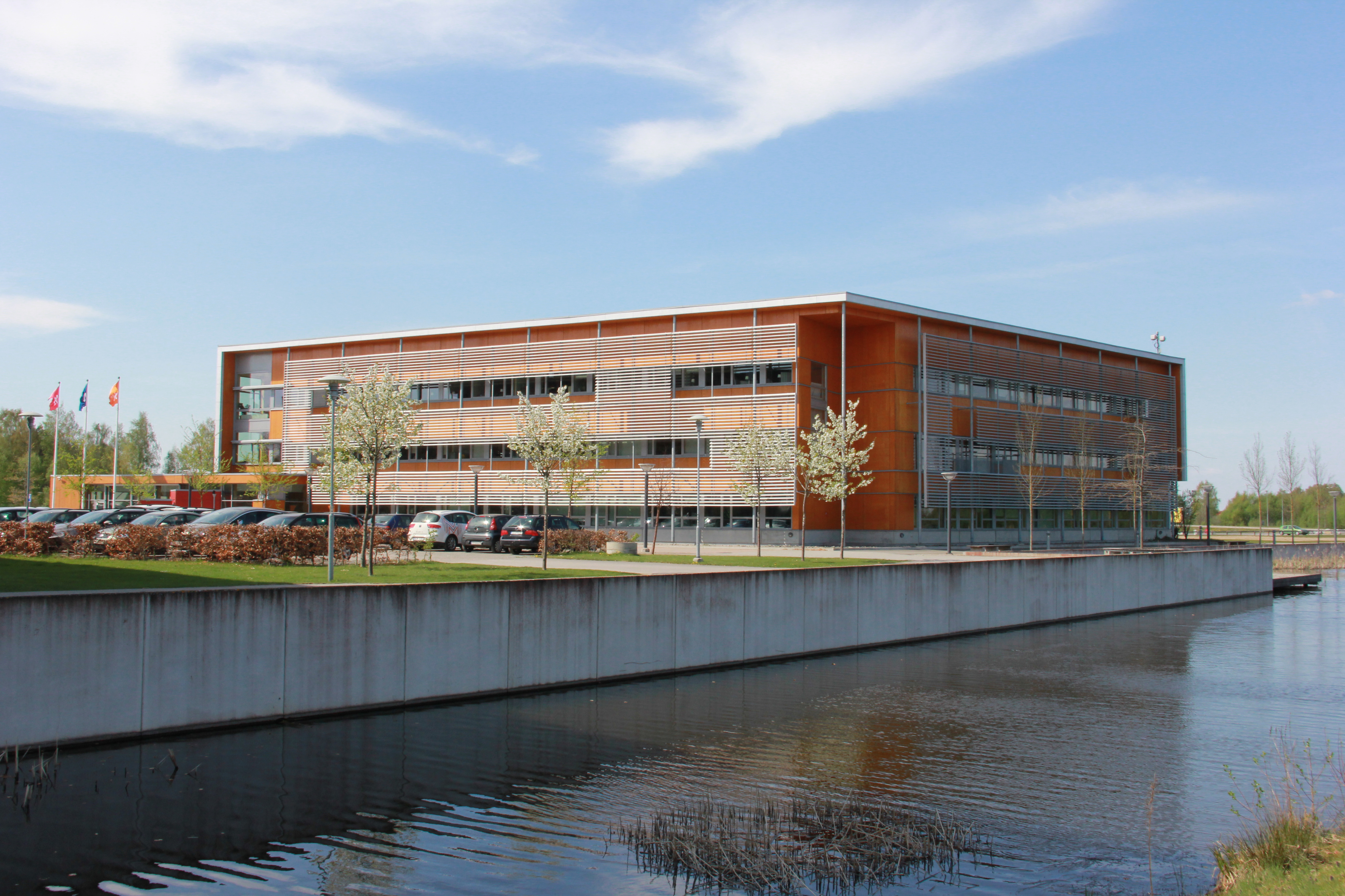 Hus Delta i Videum Science Park. Fotograf: Anna Joanzón